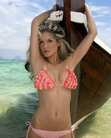 Dominika Hužvárová